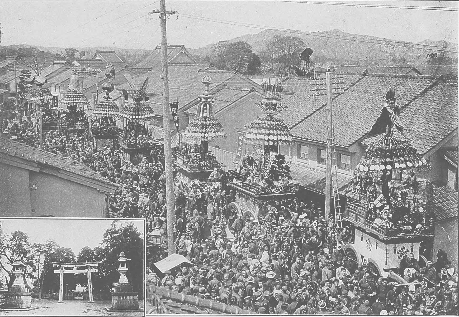 説明文に「慶長中前田利長城を高岡に築きて之に移るや前代利家曾て豊臣秀吉より賜はりたる聚楽亭の材を以て一の山車を作りて城下の民に与ふ製作機巧燦然目を奪ふ毎年五月郷社関野神社大祭に方り神輿渡御の先駆として優美なる楽を奏しつゝ之を曳く遠近来り観る者堵の如し」とあり。